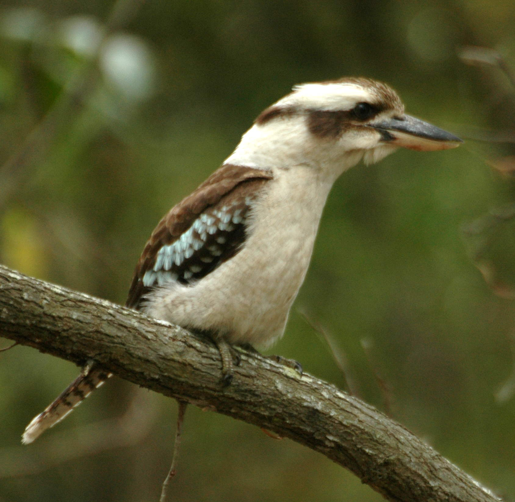 Laughing Kookaburra (Dacelo novaeguineae)